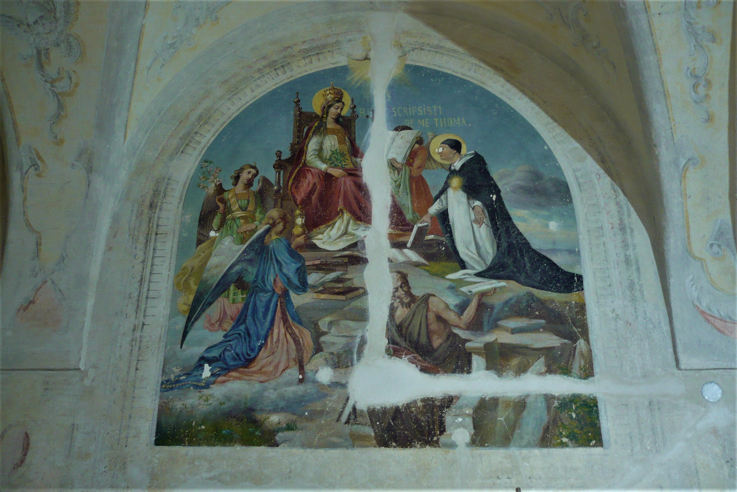 Klasztor dominikanów we Lwowie. Malowidło ścienne